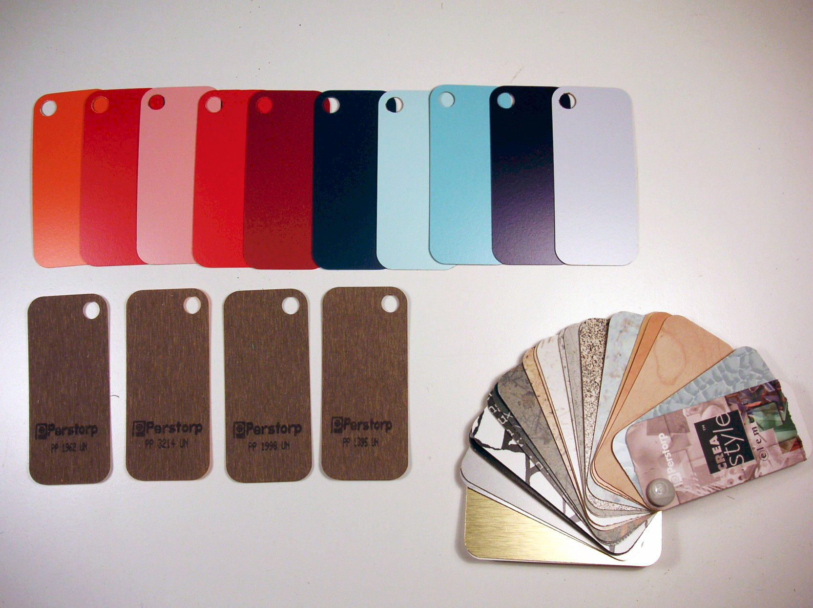 Plastlaminat, högtryckslaminat, Perstorpsskiva